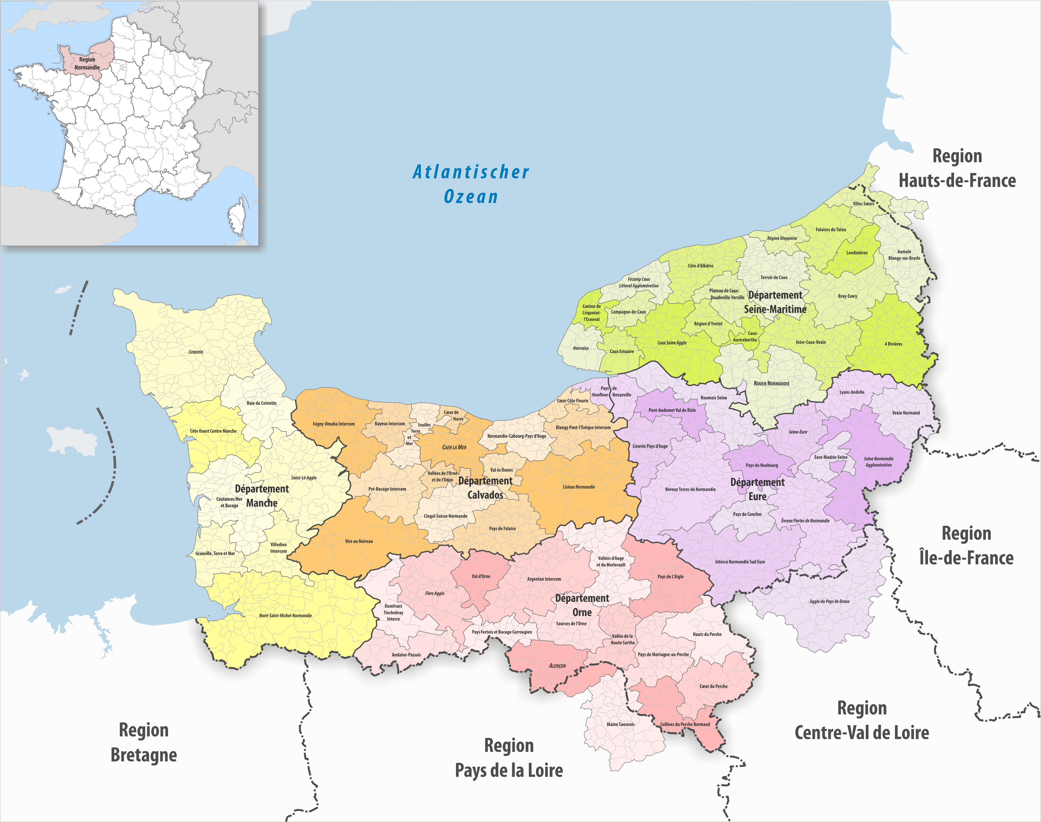 Gemeinden, Gemeindeverbände und Départemente in der Region Normandie